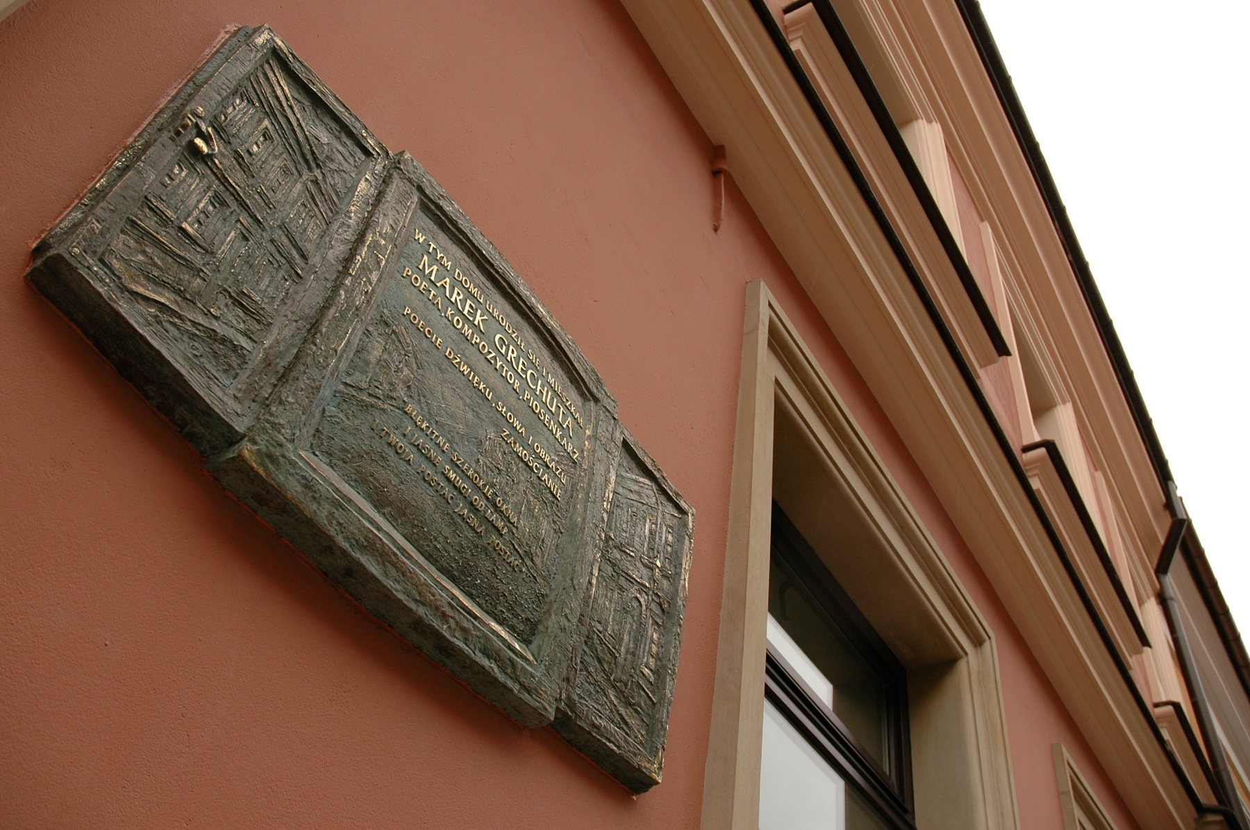 Tablica przy ul. Grodzkiej 7 w Zamościu